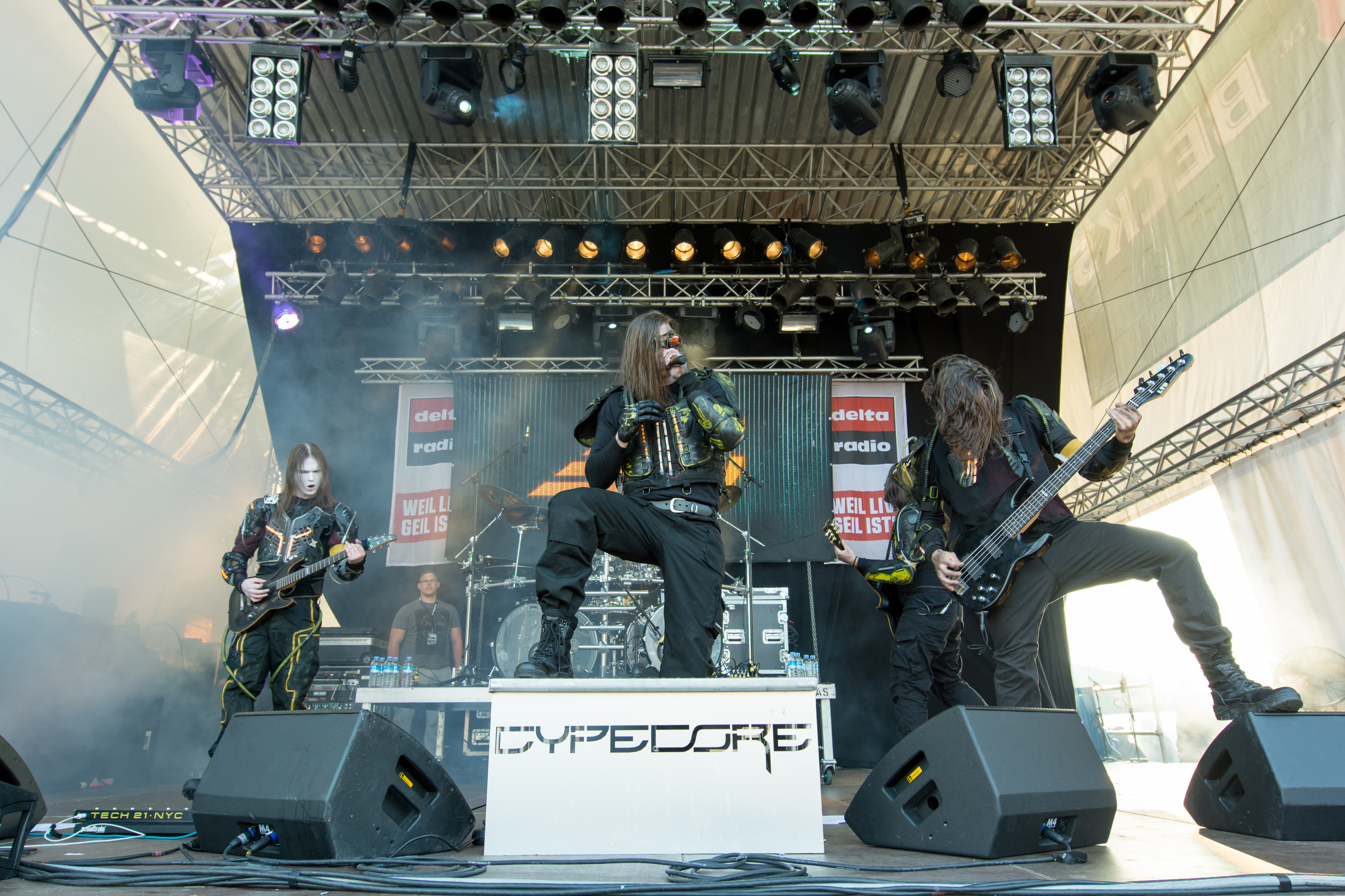 Cypecore beim Hafen Rock 2017